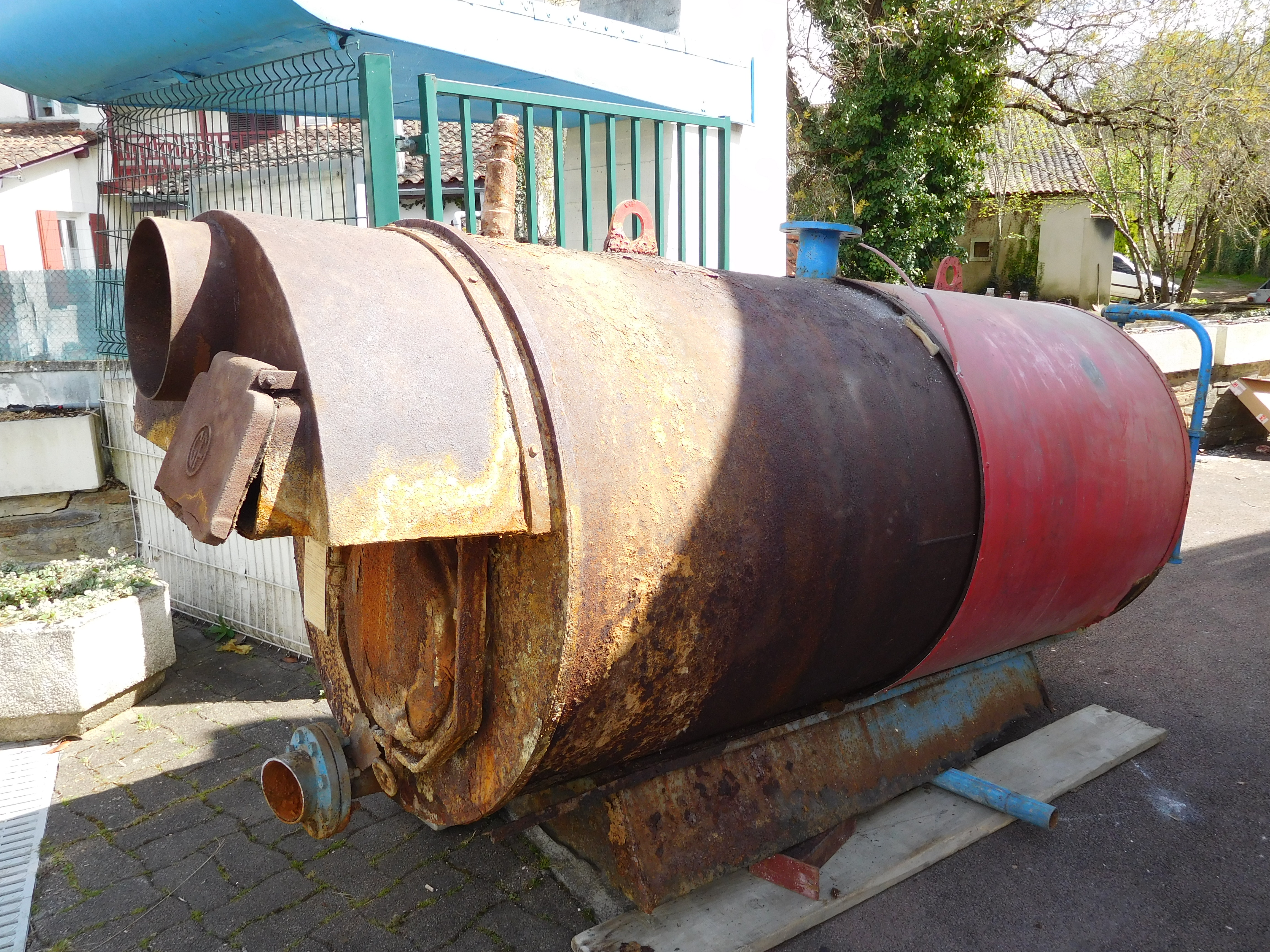 Chaudière Guillot (Lyon, Groupe Atlantic), sans doute de 1969 d'après le numéro de série de l'appareil, remplacée en 2016, de la piscine de Mussidan (Dordogne, France). Type Totaltub, en acier, n° appareil 690243, puissance : 540 thermies/heure, pression maximale : 4 bars.